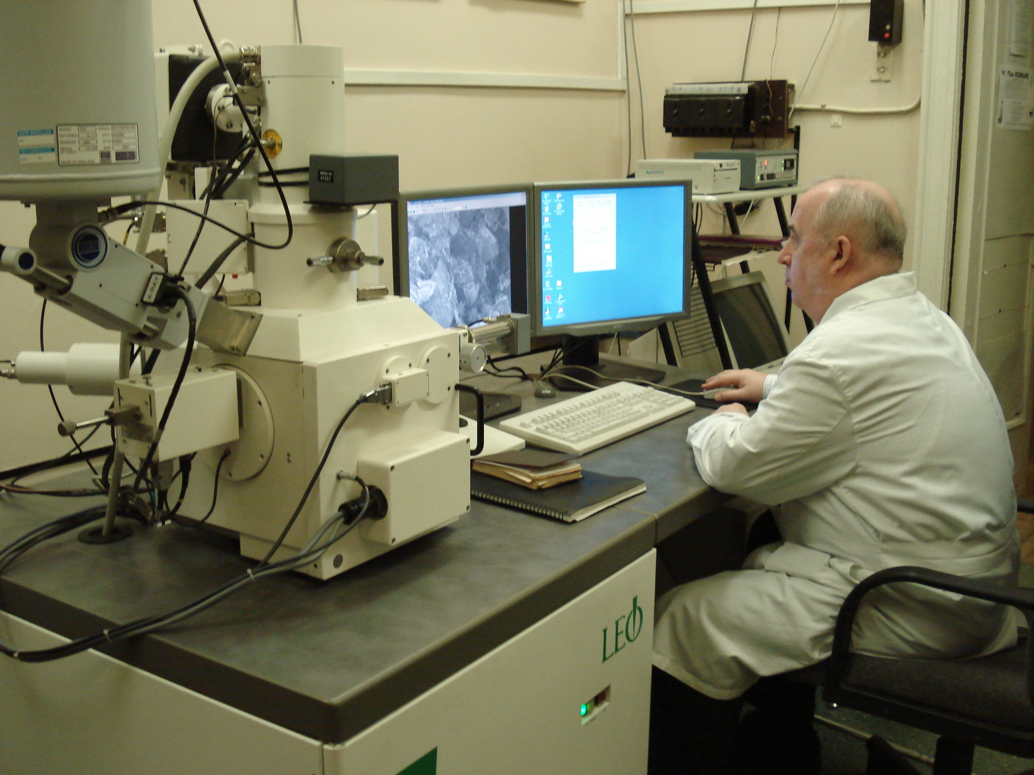 В.Н.Соколов в лаборатории электронной микроскопии